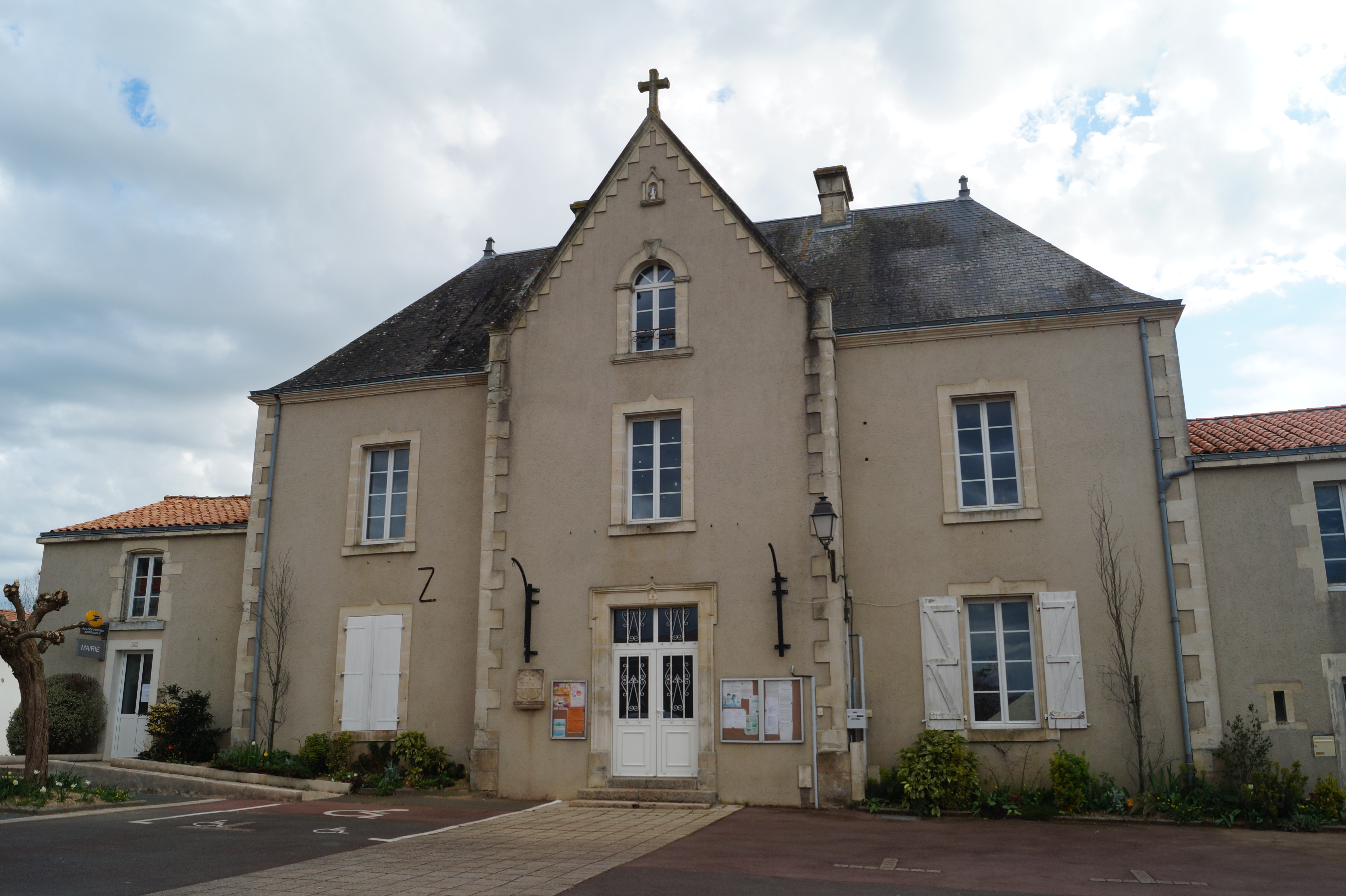 Le bâtiment abritant la mairie annexe de Saint-Philbert-du-Pont-Charrault depuis la place de la Mairie.